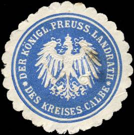 Sealing stamp Title: Der Königlich Preussische Landrath des Kreises Calbe Description: blau, weiß, geprägt Place: Calbe size: 4 cm